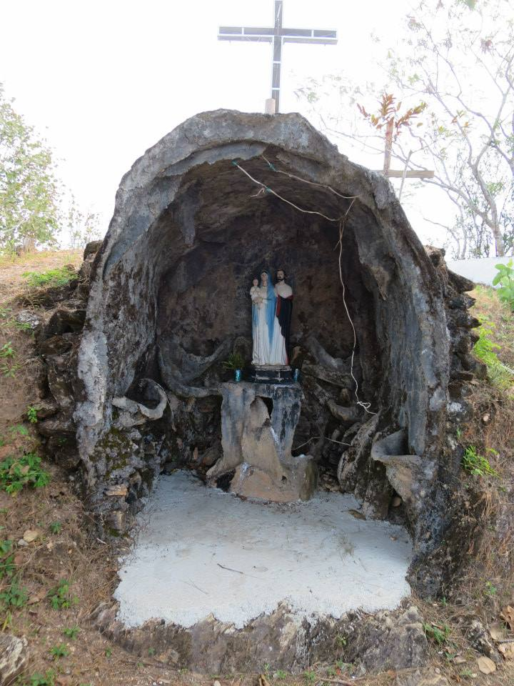 Remexio Vila